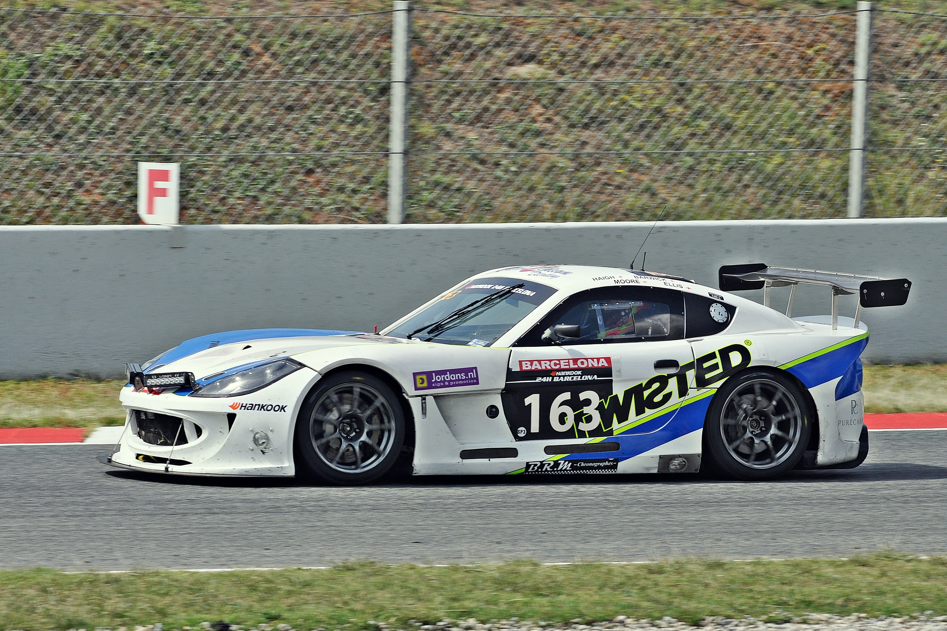 24 horas de Barcelona-circuito de Cataluña